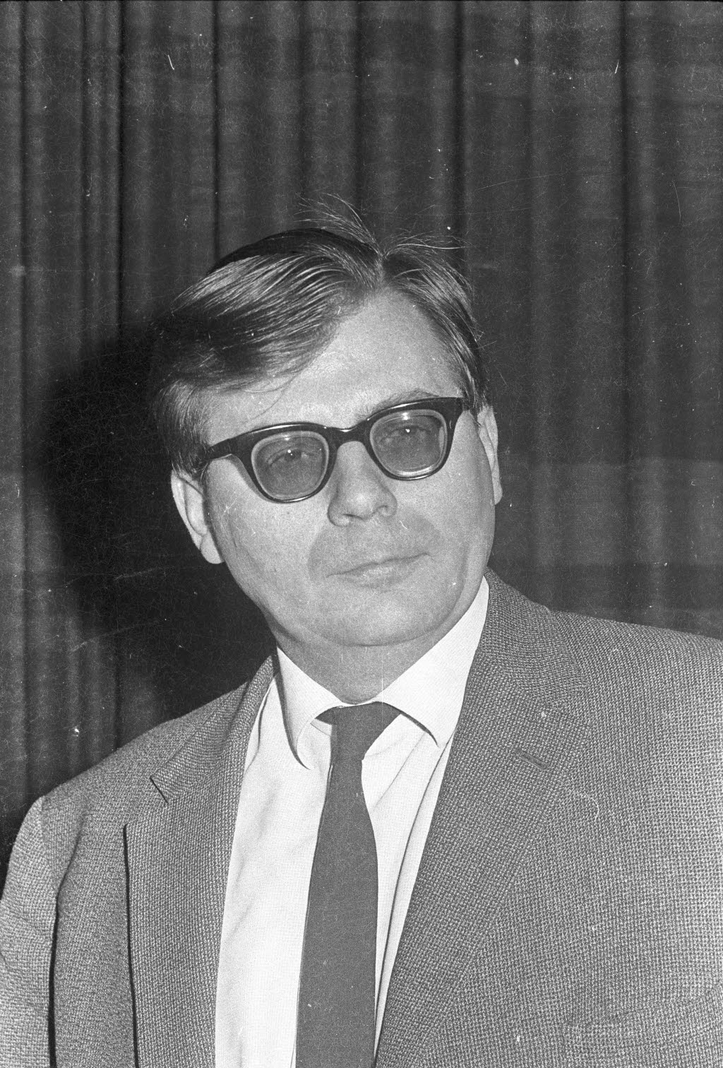 Erster Kapellmeister im Londoner Covent Garden Opera House.